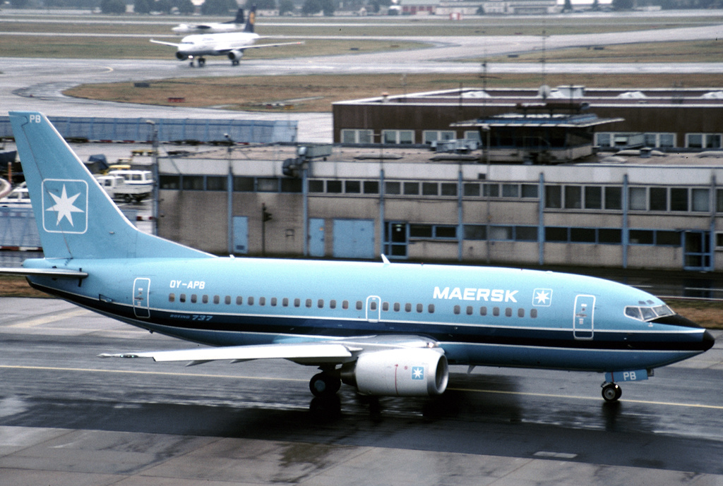 Maersk Air Boeing 737 at Frankfurt am Main